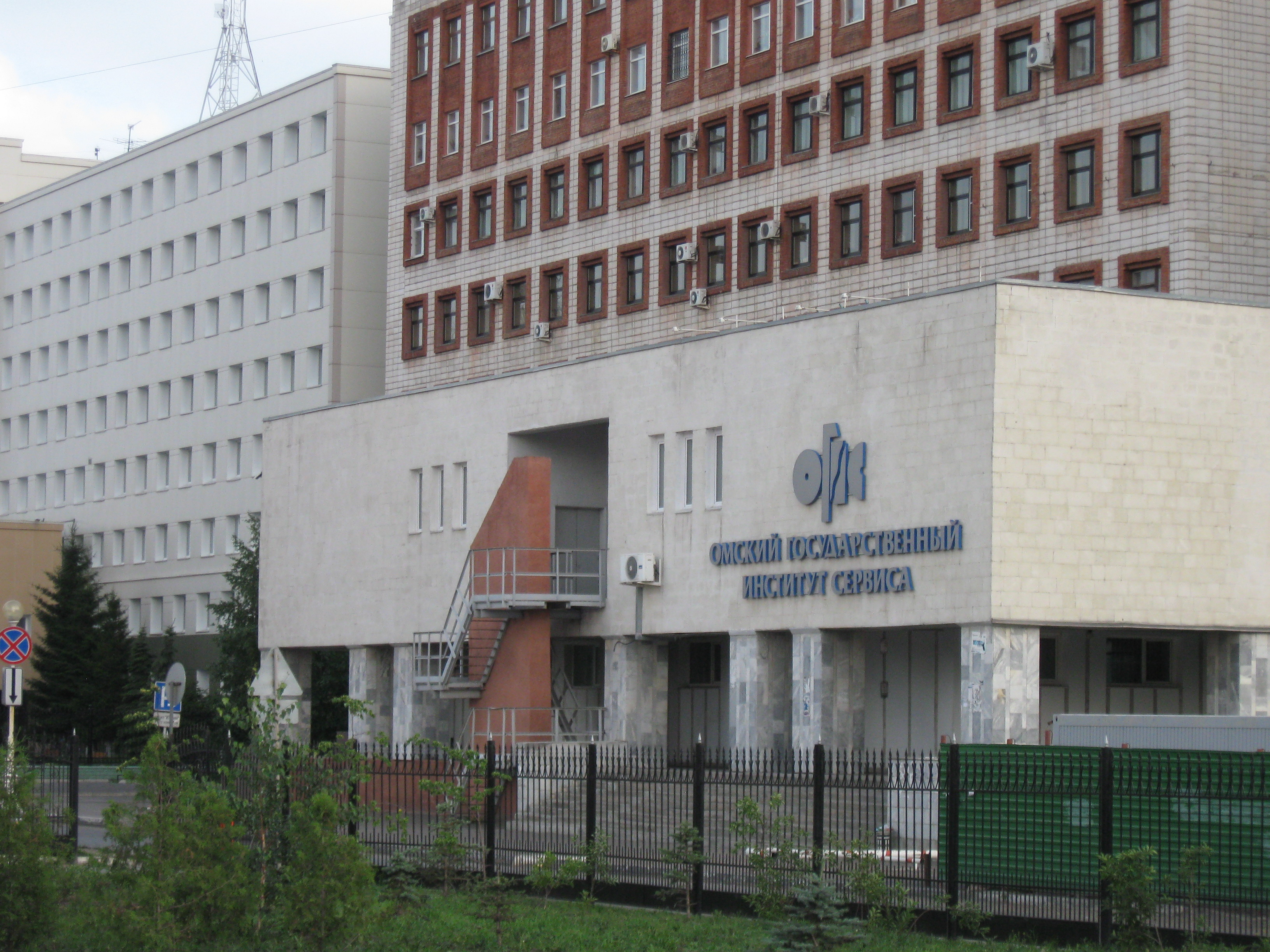 Омский государственный институт сервиса (корпус на ул. Певцова, 13)